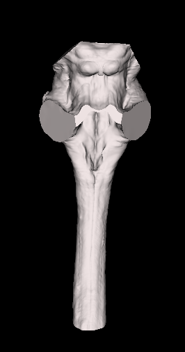 Anatorama